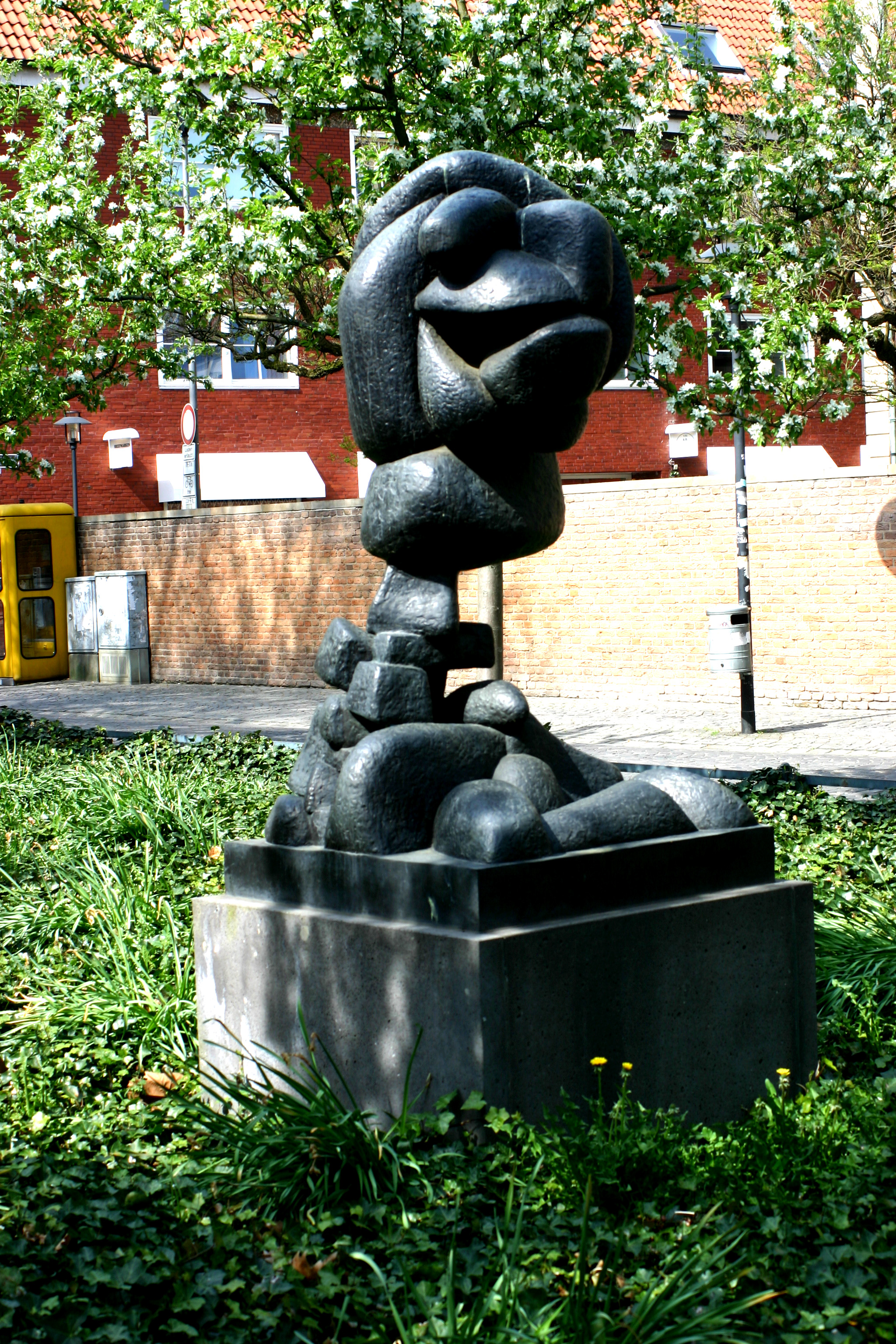 Skulptur auf dem Maria-Euthymia-Platz in Münster